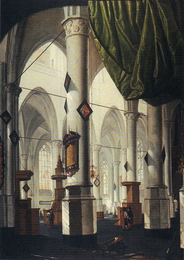 Intérieur d'Eglise de Daniel van Blieck, 17e siècle, musée des beaux-arts de Reims, France.